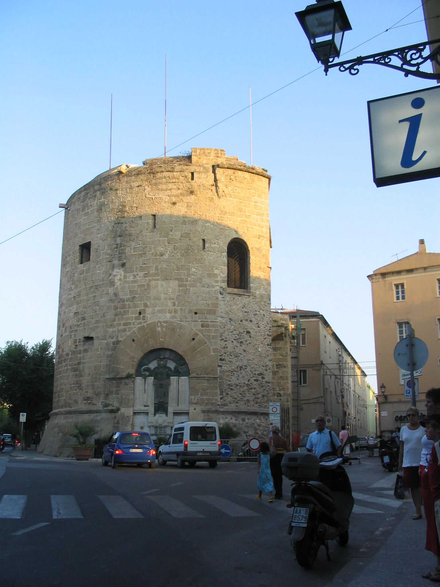 Torre del Portal de la muralla de L'Alguer. Sardenya